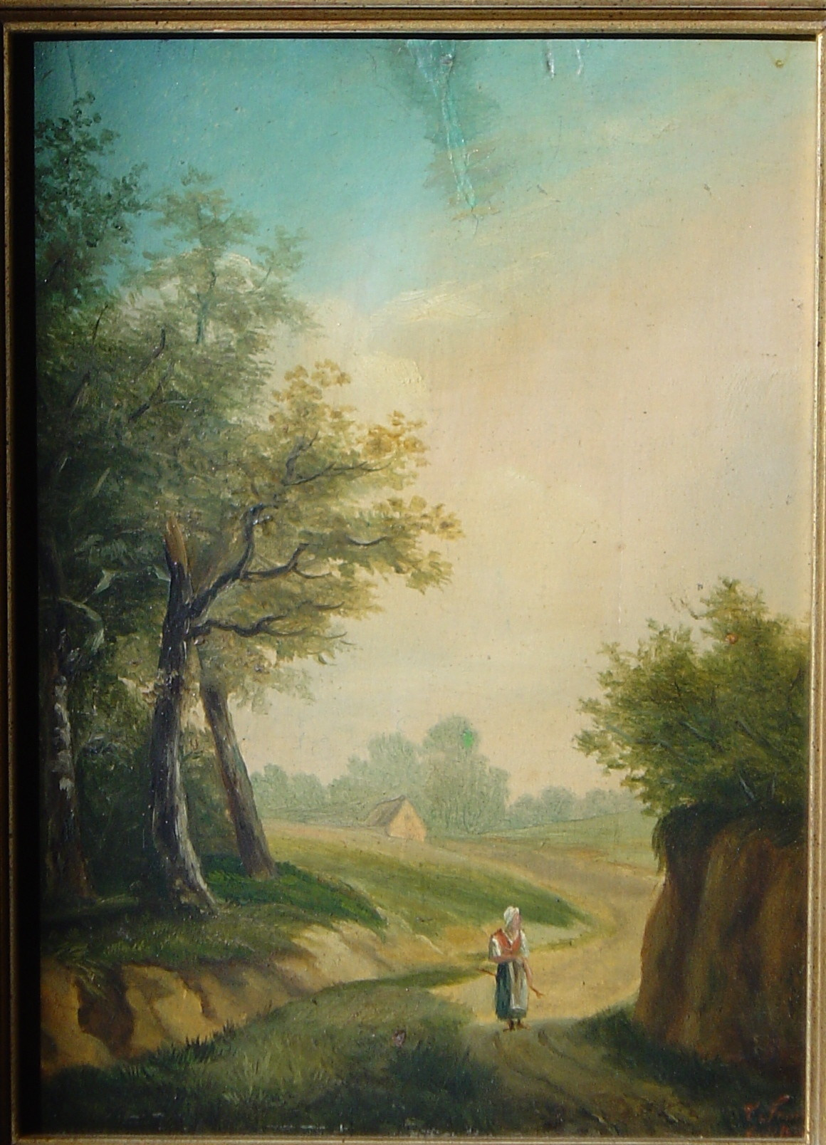 Peinture sur bois par L. Goville (cm 16,7 x 22,7), Chemin creux, année 1830